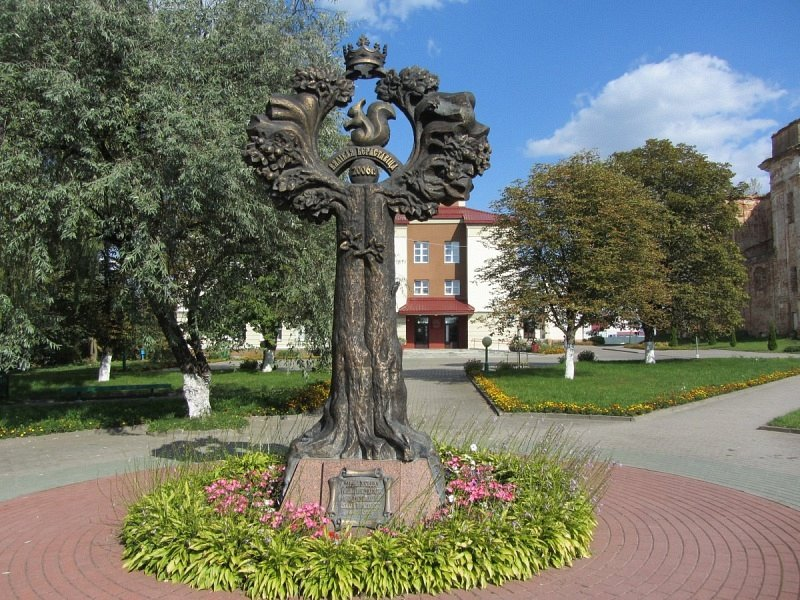 Вялікая Бераставіца Знак